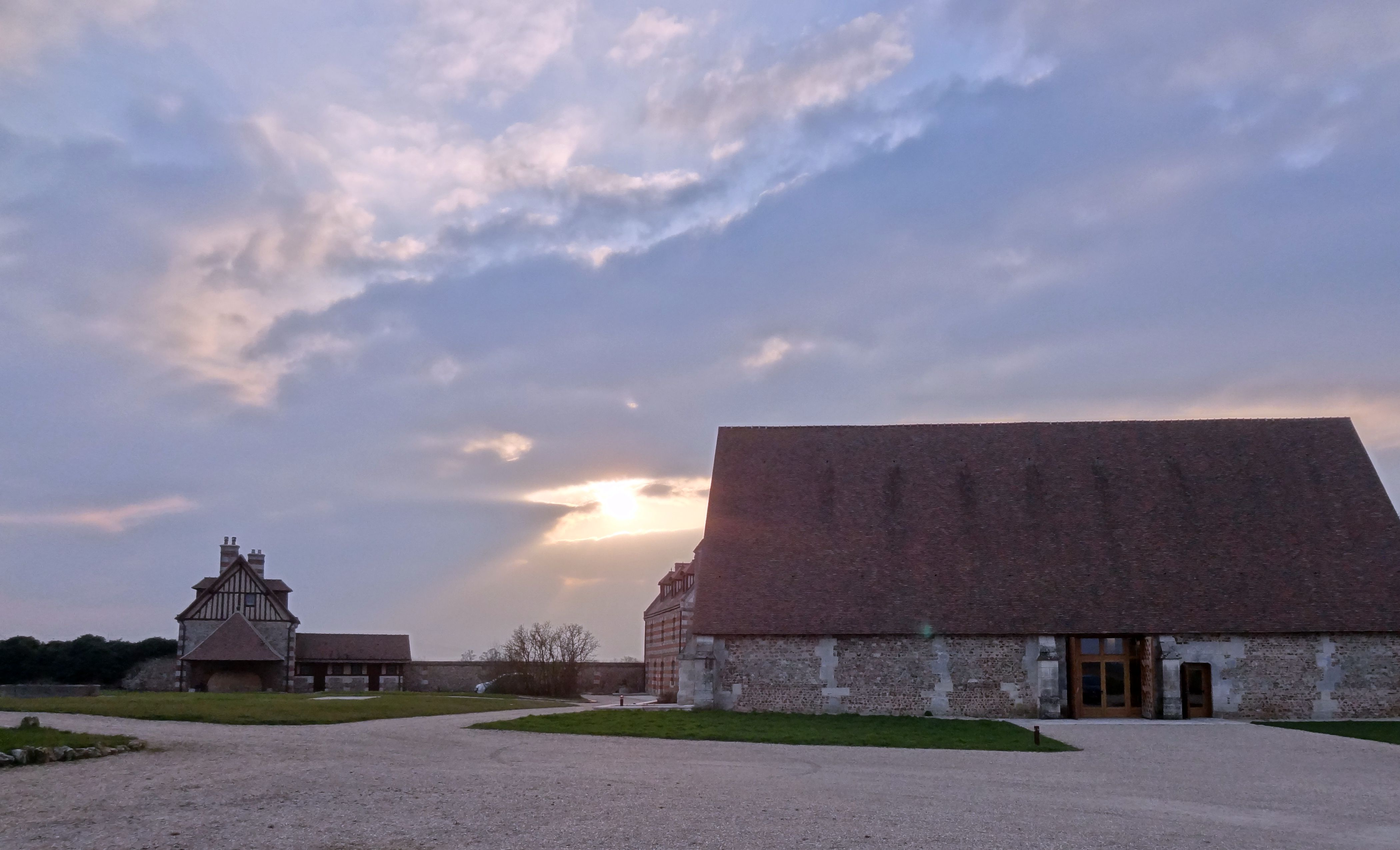 La Commanderie de Saint-Étienne-de-Renneville était une maison Templière prospère au Moyen-Âge. Elle est situé près d'Evreux en Normandie. On y voit, de gauche à droite, le fournil, la maison du régisseur et la grange a blé.